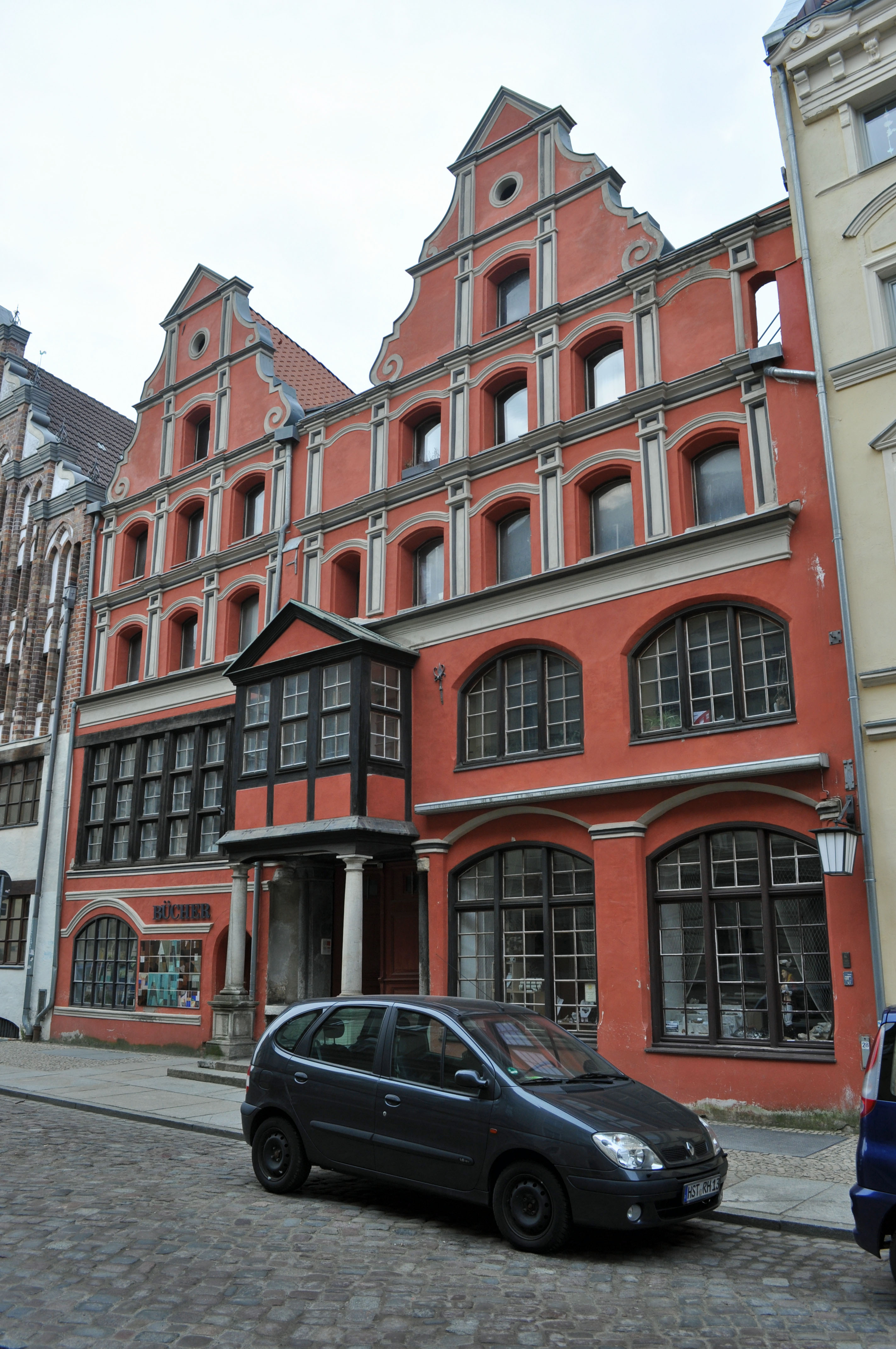 Gebäude bzw. Gebäudedetail in Stralsund. Straße und Hausnummer siehe Dateiname.